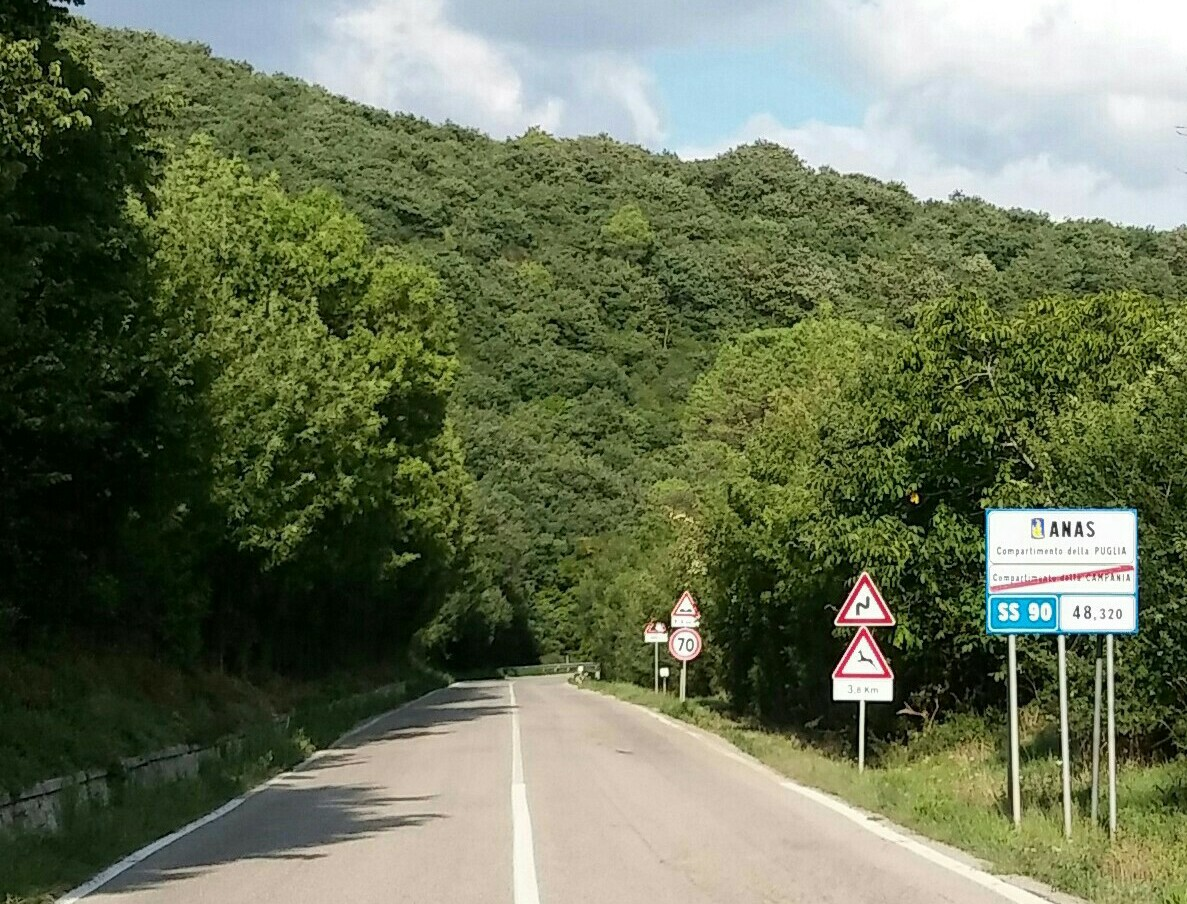 Strada statale 90 delle Puglie, confine regionale Campania-Puglia